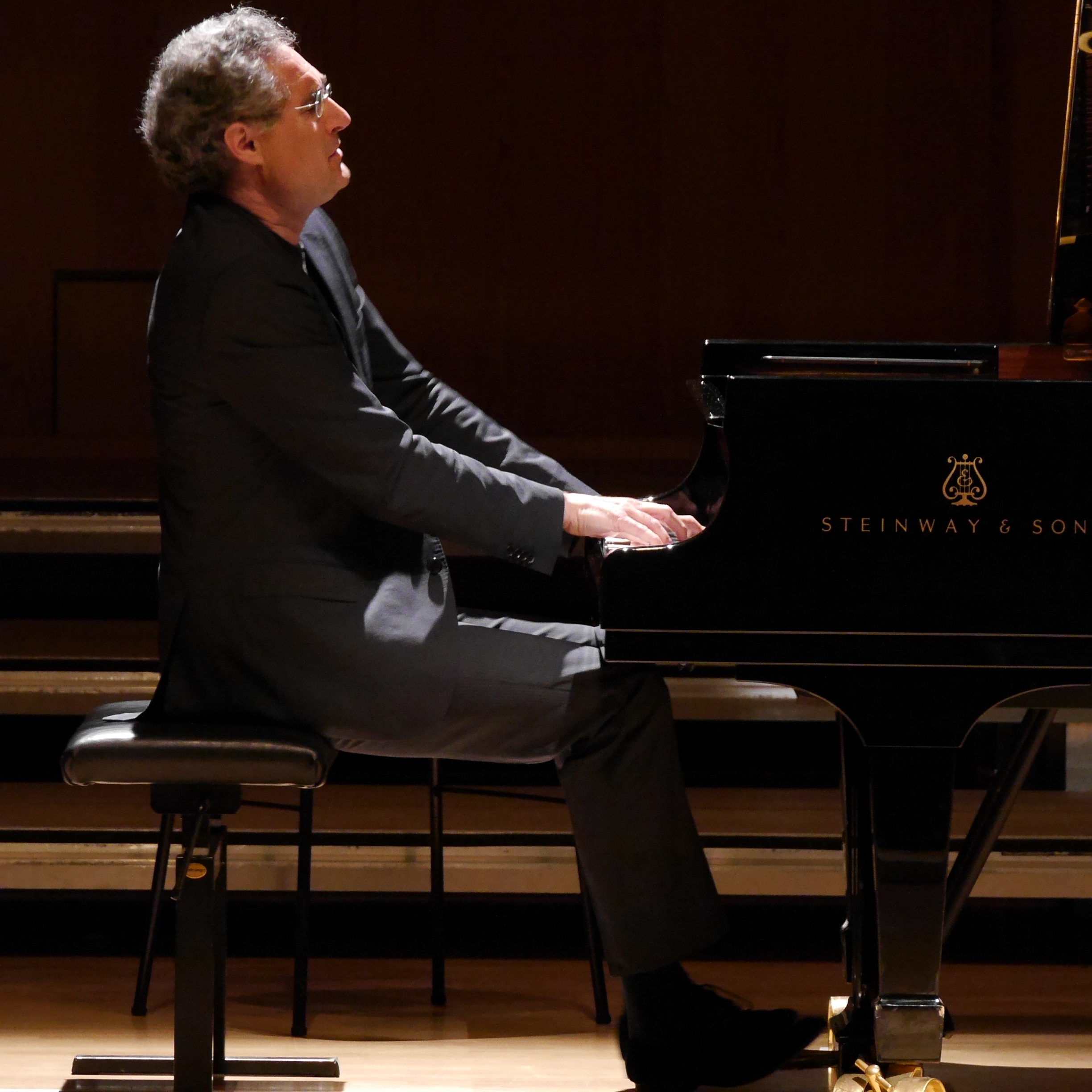 Matthias Kirschnereit. Ehrenkonzert zum 90. Geburtstag von Prof. Renate Kretschmar-Fischer am 31.05.2015 im Konzerthaus der HfM Detmold.